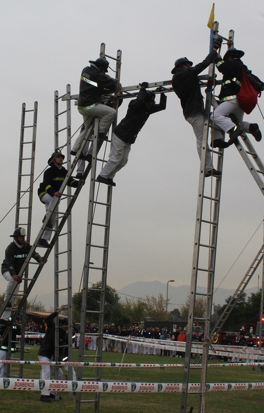 Bomberos compitiendo en la especialidad de escalas (estructura llamada "Troley").